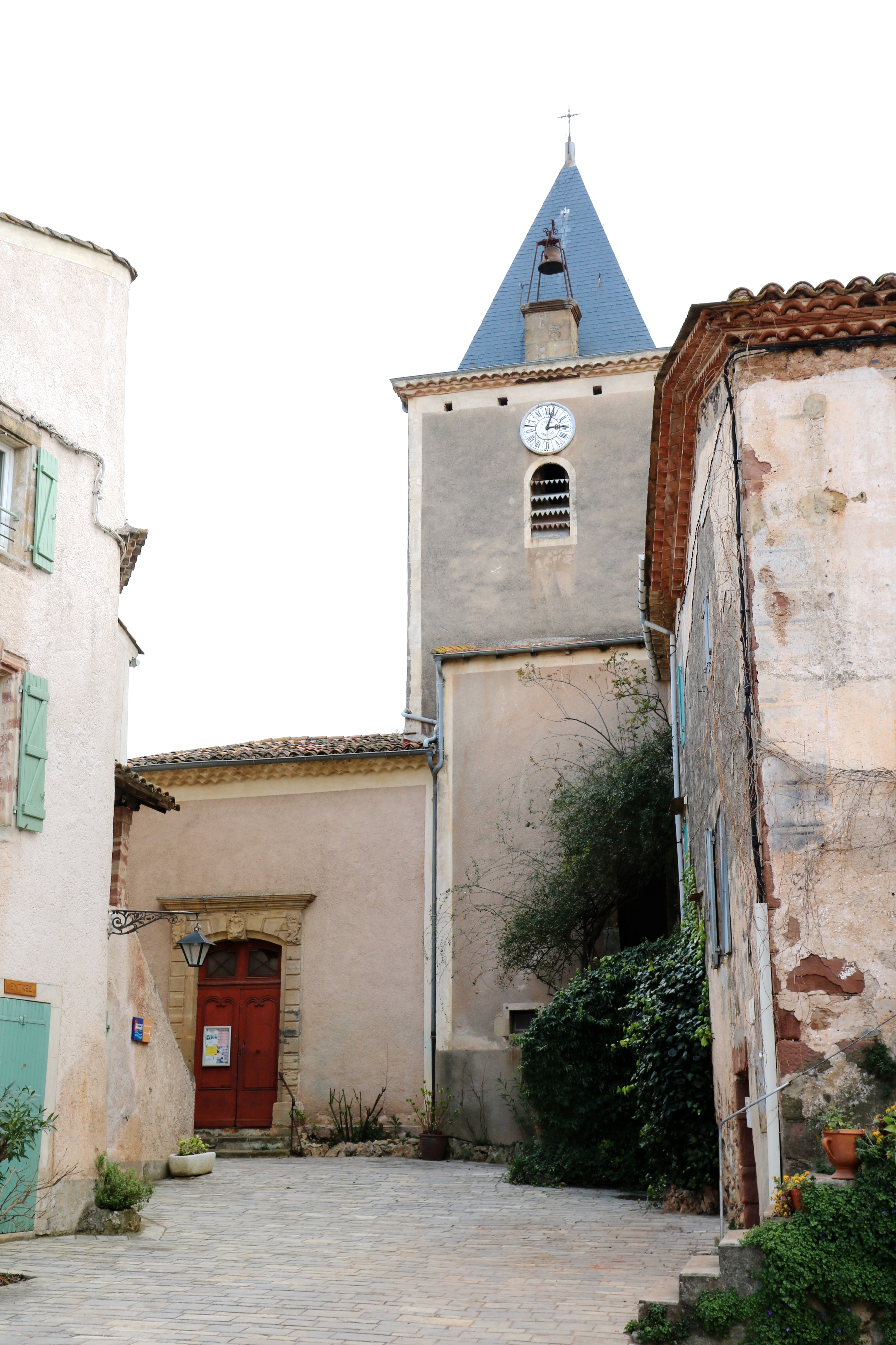 Salasc (Hérault, France) - église Saint-Geniès-d'Arles